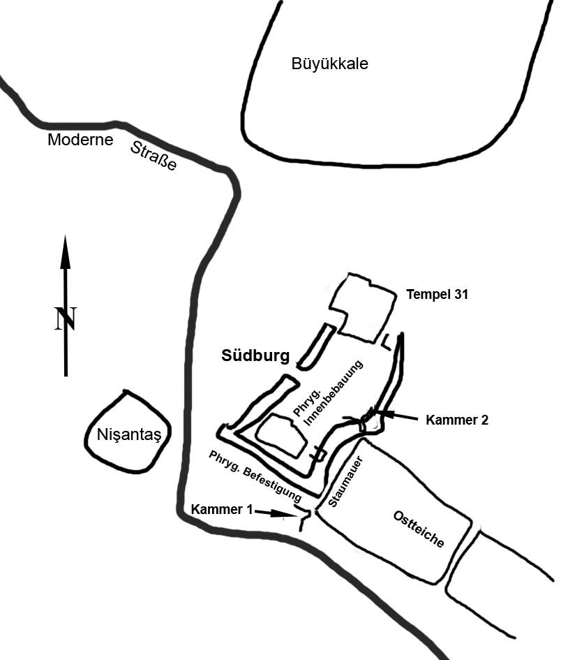 Lageplan der Südburg von Hattusa, Zentraltürkei